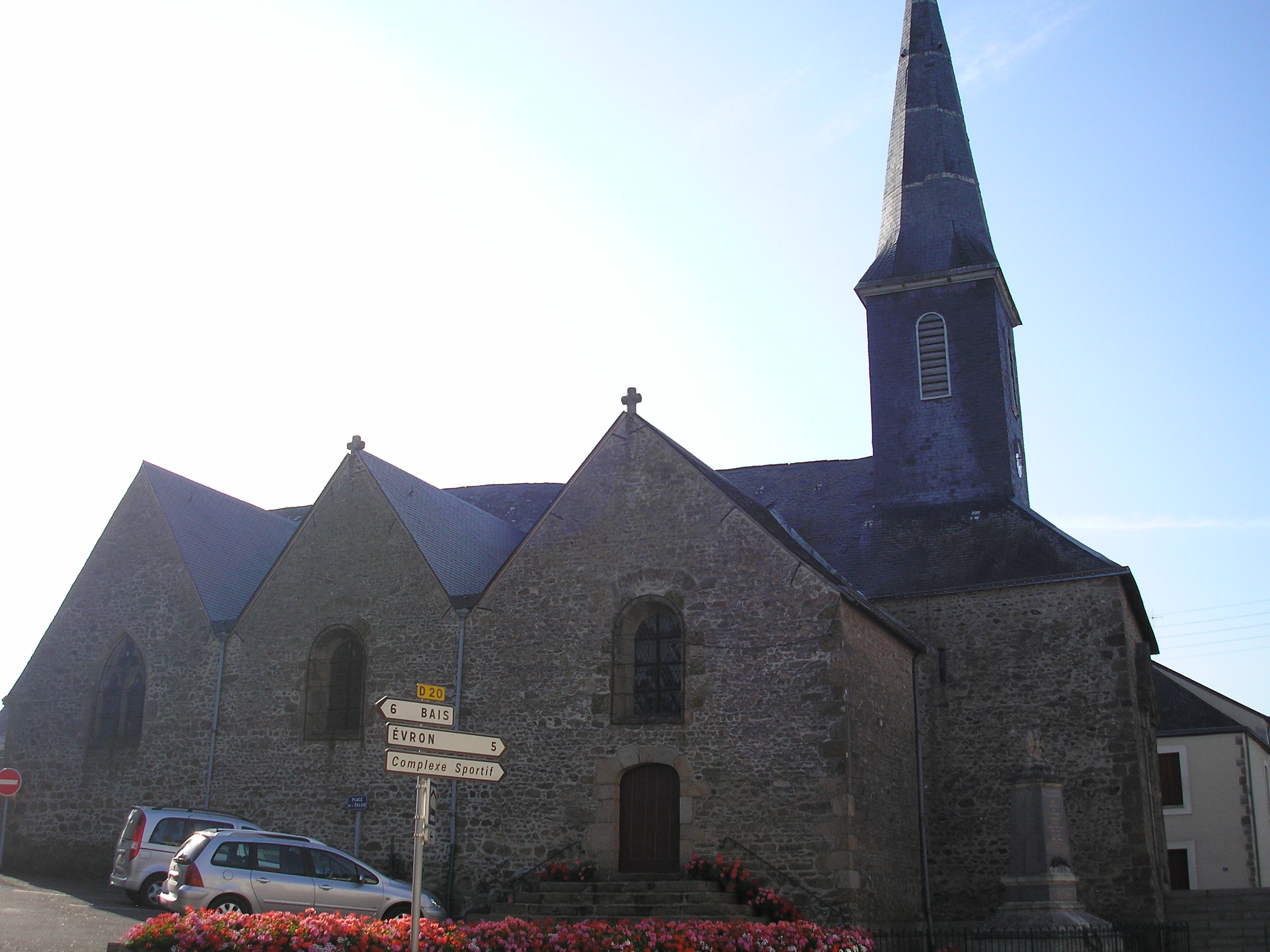 Eglise de Sainte Gemmes le Robert.